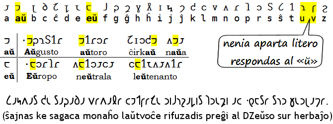 Diftonga adapto de la Ŝava alfabeto al Esperanto